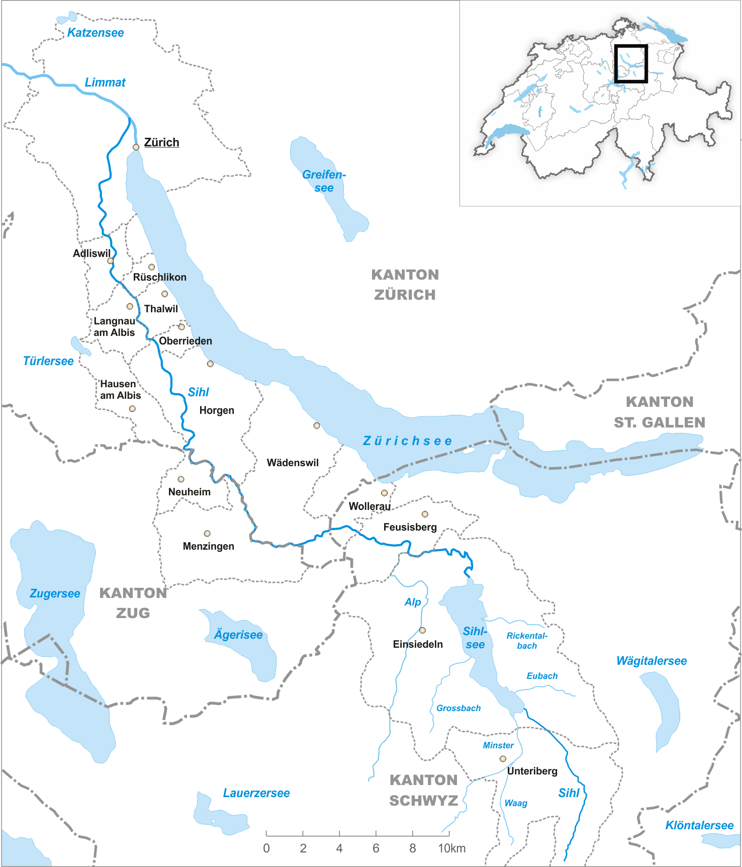 Description: Sihl Designer: Tschubby